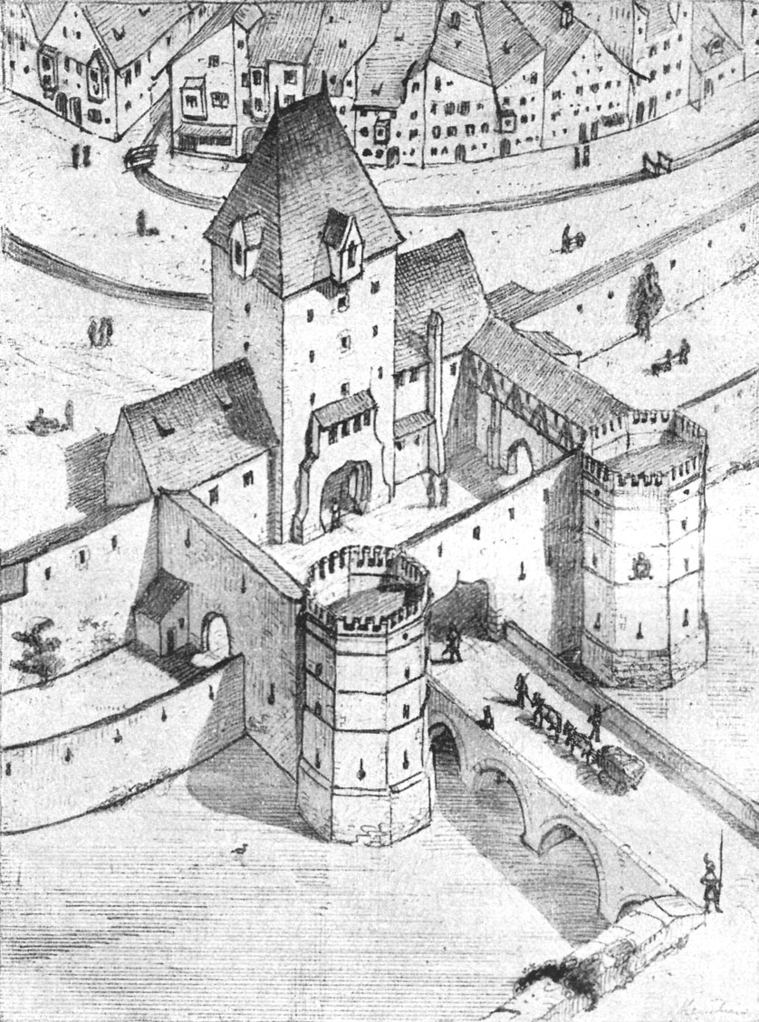 Abb. 28. Das Isartor (Außenseite).